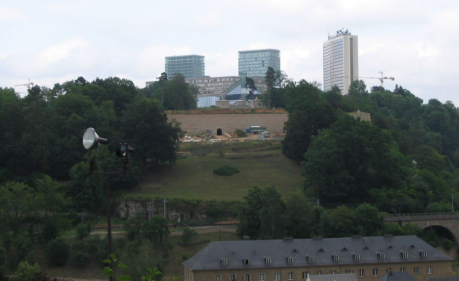 Bauarbeiten an Fort Thüngen (Drei Eicheln) in Luxemburg (Stadt)